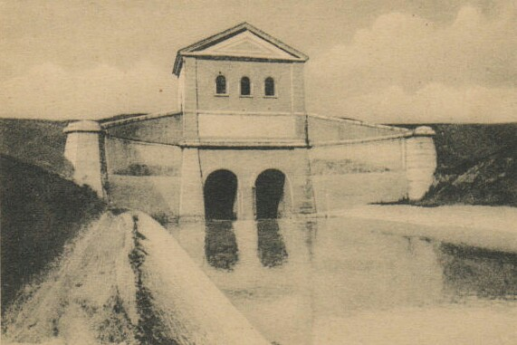 Botte Napoleonica sotto passante Panaro - Bondeno